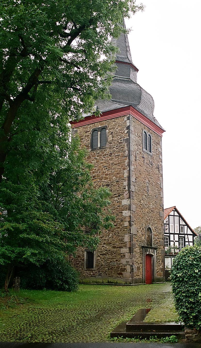 Turm der alten Pfarrkirche in Hennef, im Hintergrund der Abtshof